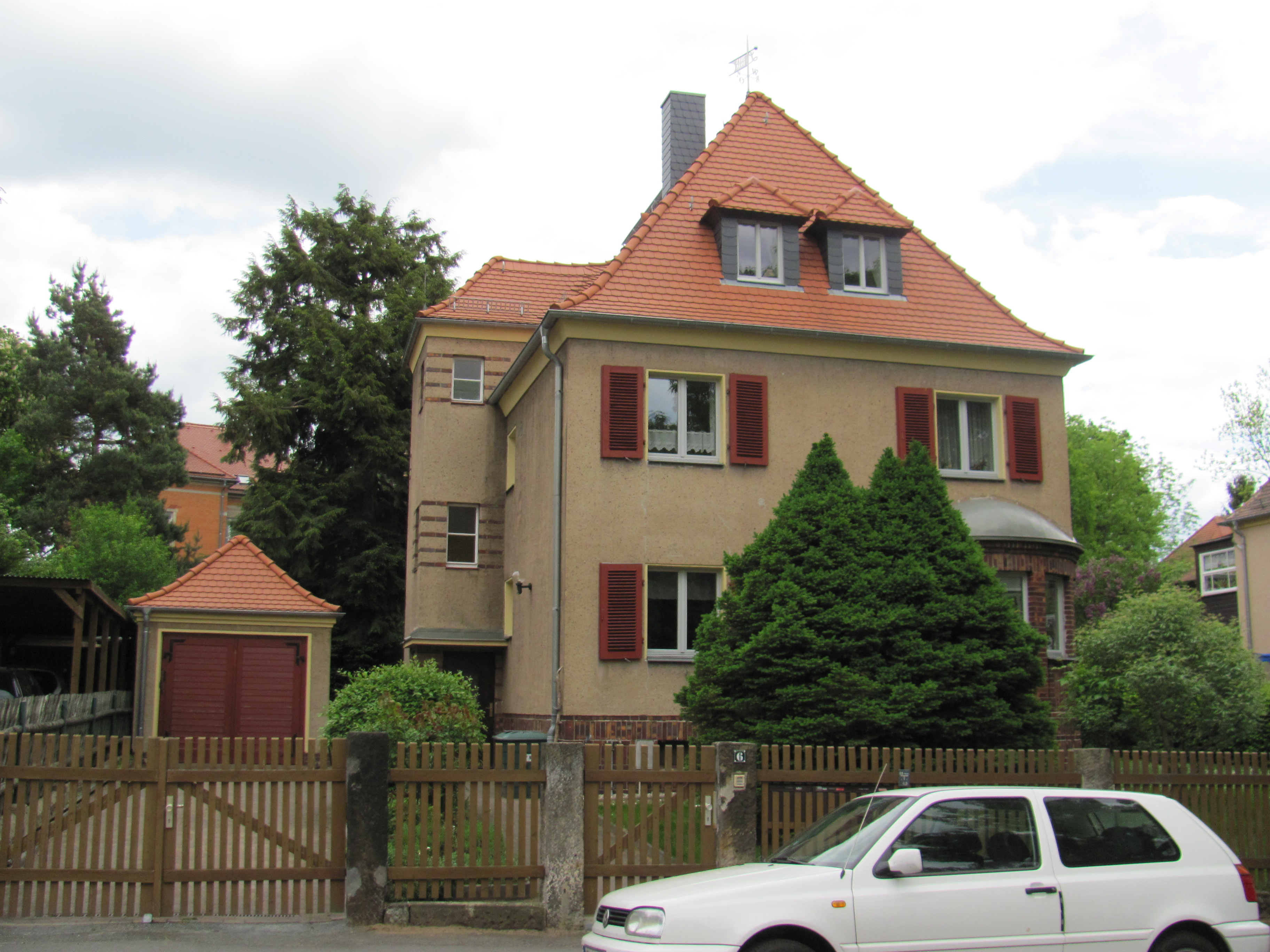 Niederlößnitz Kulturdenkmale